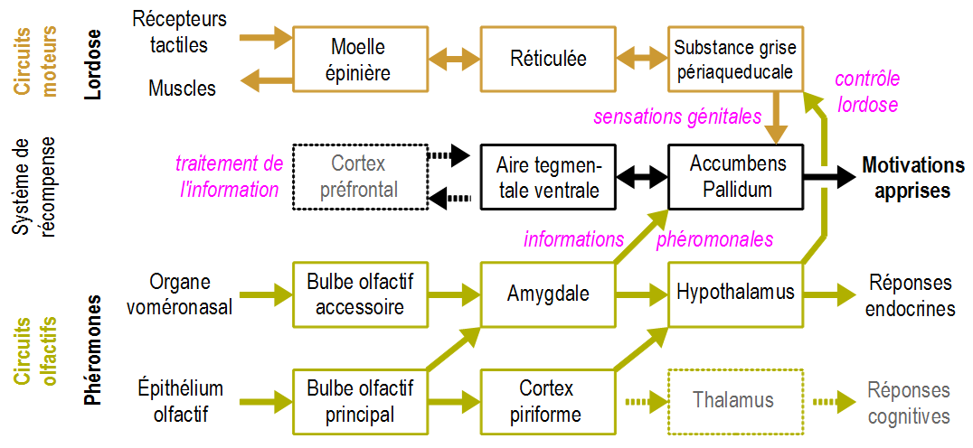 Description des principaux circuits neurobiologiques innés qui contrôlent l'apprentissage de la motivation sexuelle chez les mammifères femelles non-primates. Synthèse d'après : Kobayakawa K., Kobayakawa R., Matsumoto H. , Oka Y., Imai T., Ikawa M., Okabe M., Ikeda T., Itohara S., Kikusui T., Mori K., Sakano H. Innate versus learned odour processing in the mouse olfactory bulb. Nature, 450(7169):503-508, 2007 ; Novejarque A., Gutierrez-Castellanos N., Lanuza E., Martinez-Garcia F. Amygdaloid projections to the ventral striatum in mice: direct and indirect chemosensory inputs to the brain reward system. Front Neuroanat., 5:54, 2011 ; Flanagan-Cato L.M. Sex differences in the neural circuit that mediates female sexual receptivity. Frontiers in Neuroendocrinology, 32(2):124-136, 2011 ; Kang N., Baum M.J., Cherry J.A. Different profiles of main and accessory olfactory bulb mitral/tufted cell projections revealed in mice using an anterograde tracer and a whole-mount, flattened cortex preparation. Chem. Senses, 36(3):251-260, 2011 ; Cibrian-Llanderal T., Tecamachaltzi-Silvaran M., Triana-Del R.R., Pfaus J.G., Manzo J., Coria-Avila G.A. Clitoral stimulation modulates appetitive sexual behavior and facilitates reproduction in rats. Physiology & Behavior, 100(2):148-153, 2010.